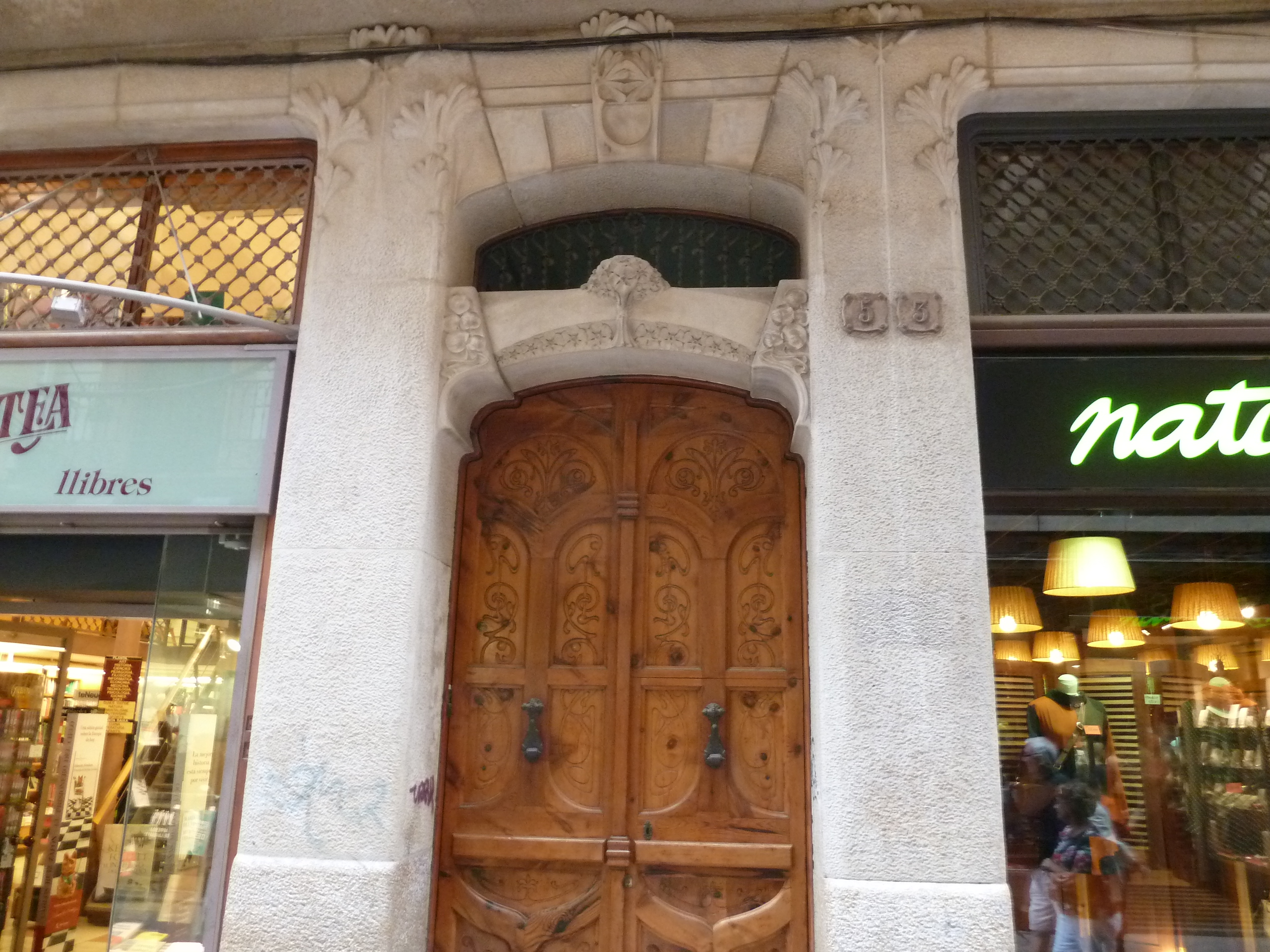 Reus